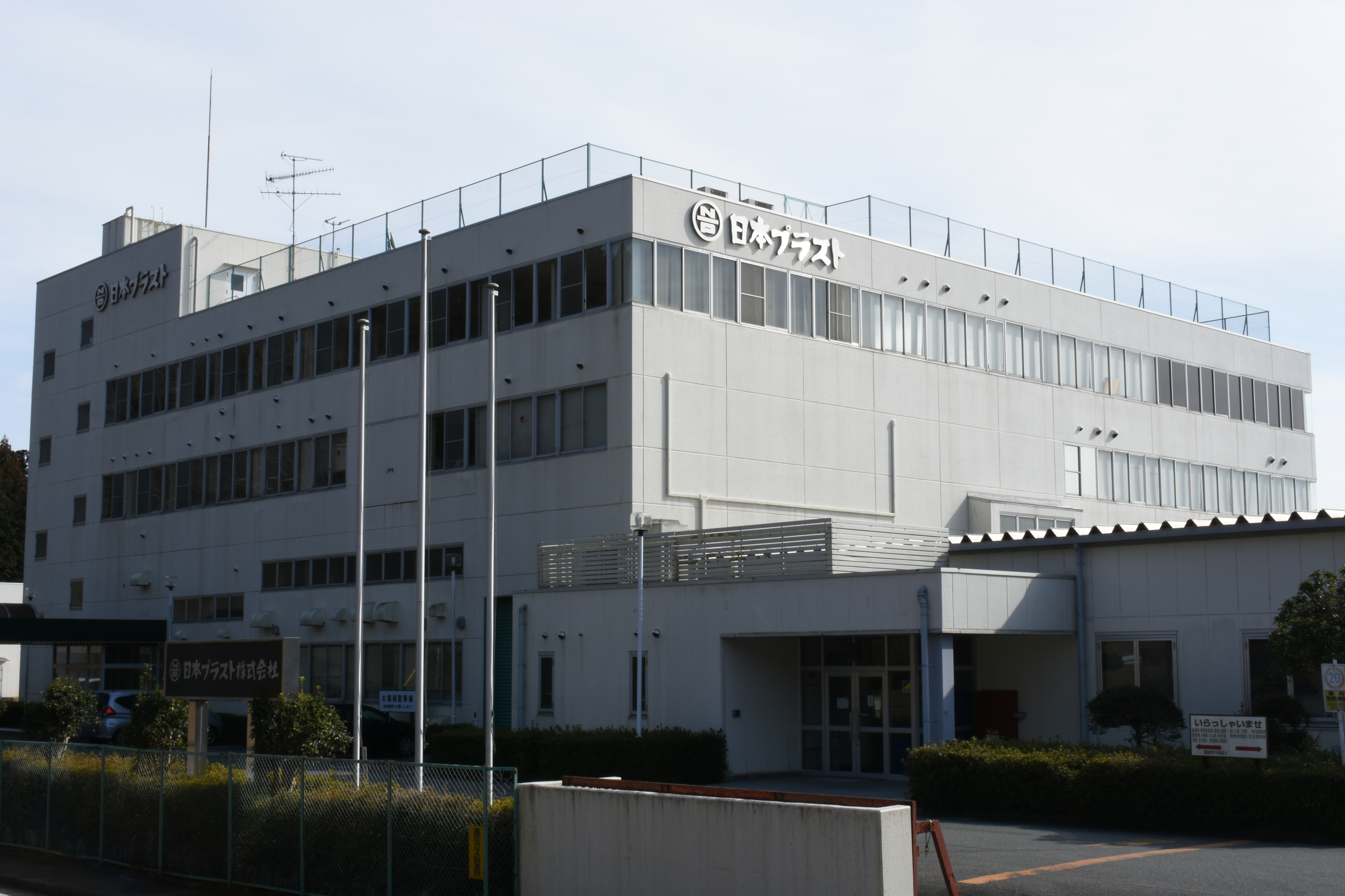 日本プラスト本社社屋（静岡県富士宮市、2019年2月16日）